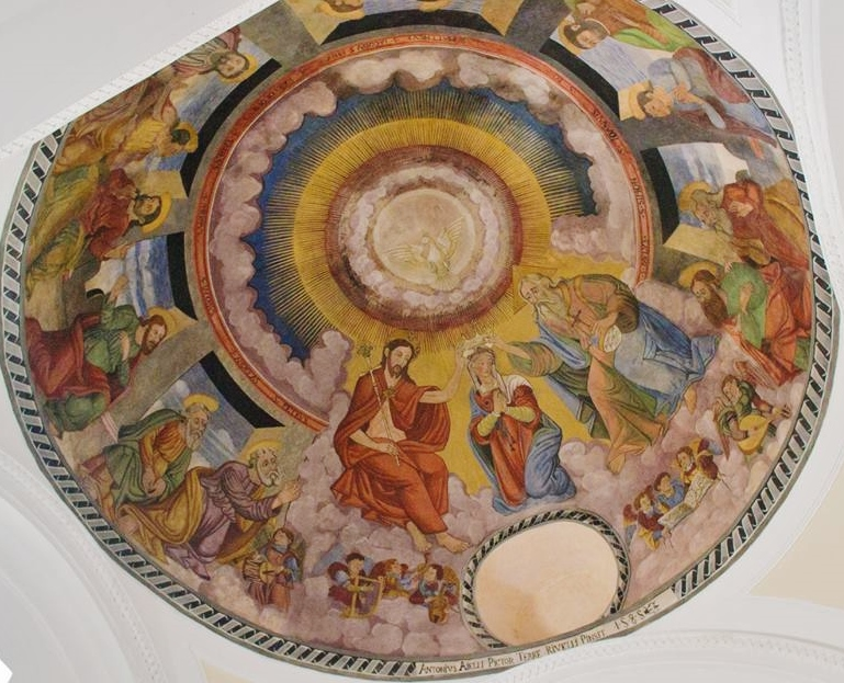 San Mauro La Bruca. Affresco sdella cupola.